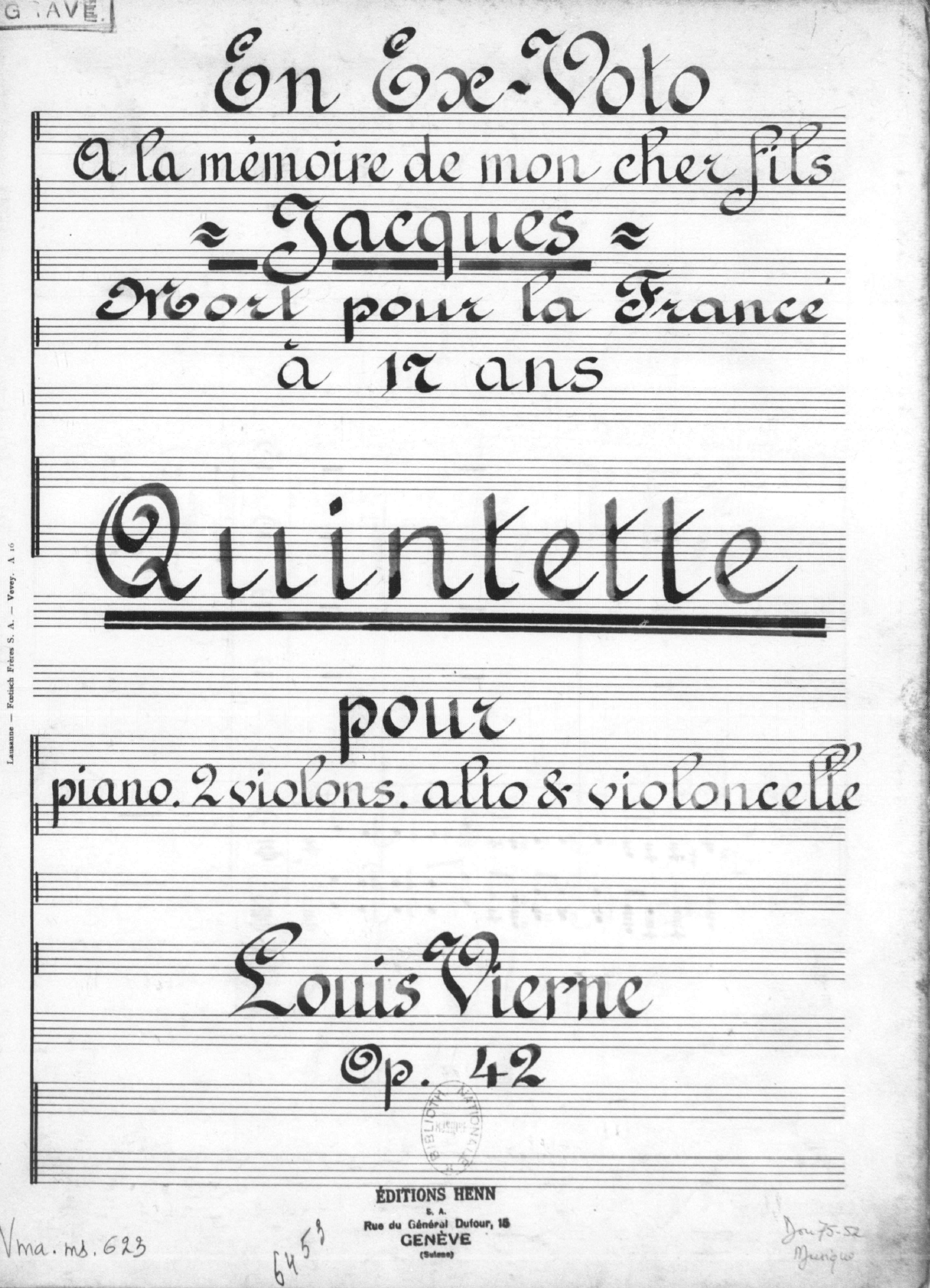 Louis Vierne - Quintette pour piano et cordes, manuscrit de la page de titre